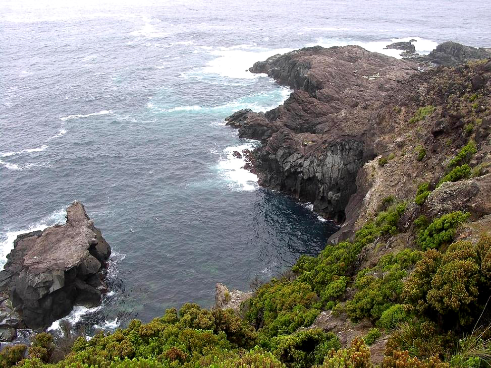 Costa das Quatro Ribeiras, Praia da Vitória, ilha Terceira, Açores